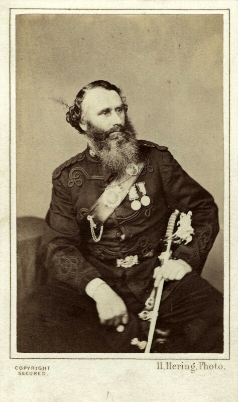 Photograph by Henry Hering